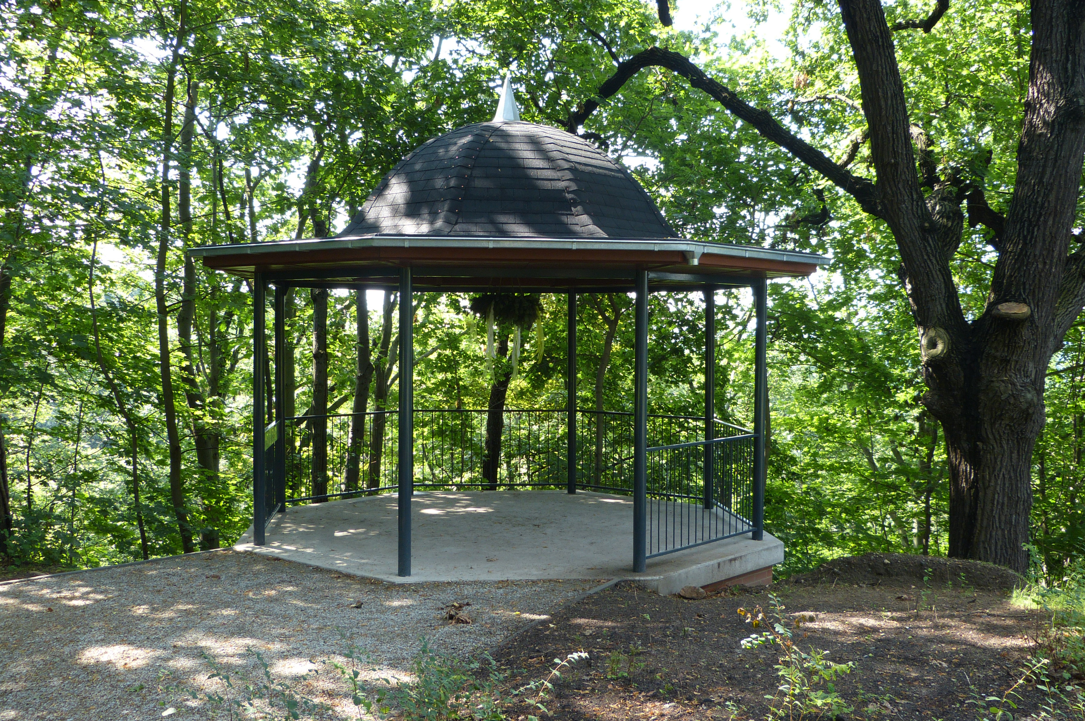 Neu errichteter Pavillon Sängerblick auf dem Georgenberg in Spremberg.